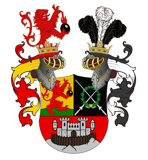 Wappen des Adelsgeschlechts Nitsche von Wallwehr nach den Beschreibungen Siebmacher Wappenbücher, Böhmischer Adel, S. 19, Tafel 16, sowie im Gothaischen Genealogischen Handbuch, adlige Häuser, Eintragung Nitsche von Wallwehr, S. 433